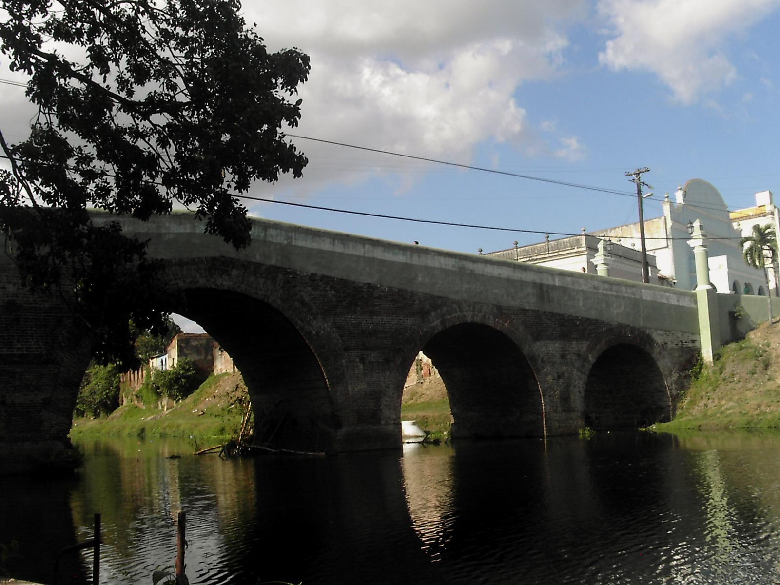 Puente Colonial sobre el río Yayabo. Sancti Spiritus. Cuba